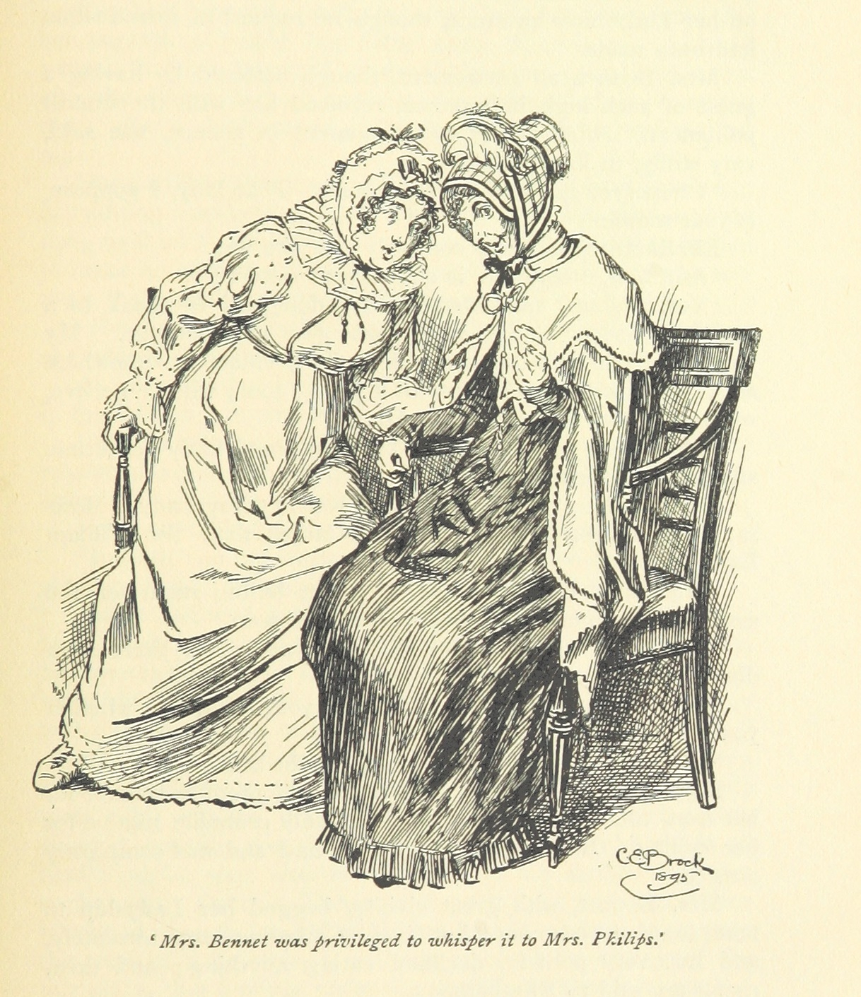 Illustration de C. E. Brock pour Pride and Prejudice (Edition MacMillan & C°) Mrs Bennet et sa soeur Mrs Philips échangent des potins.